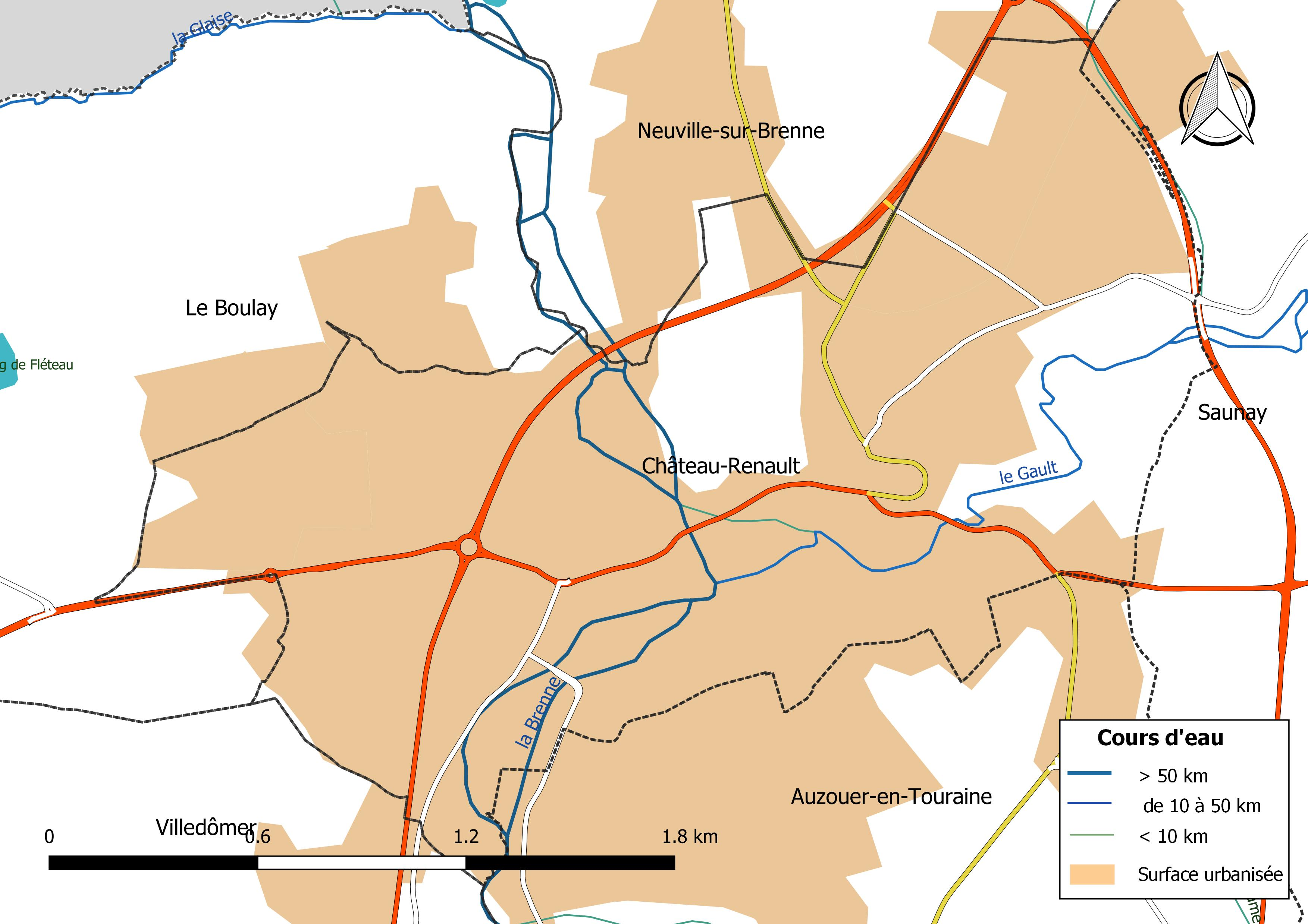 Carte du réseau hydrographique de la commune de Château-Renault (France).